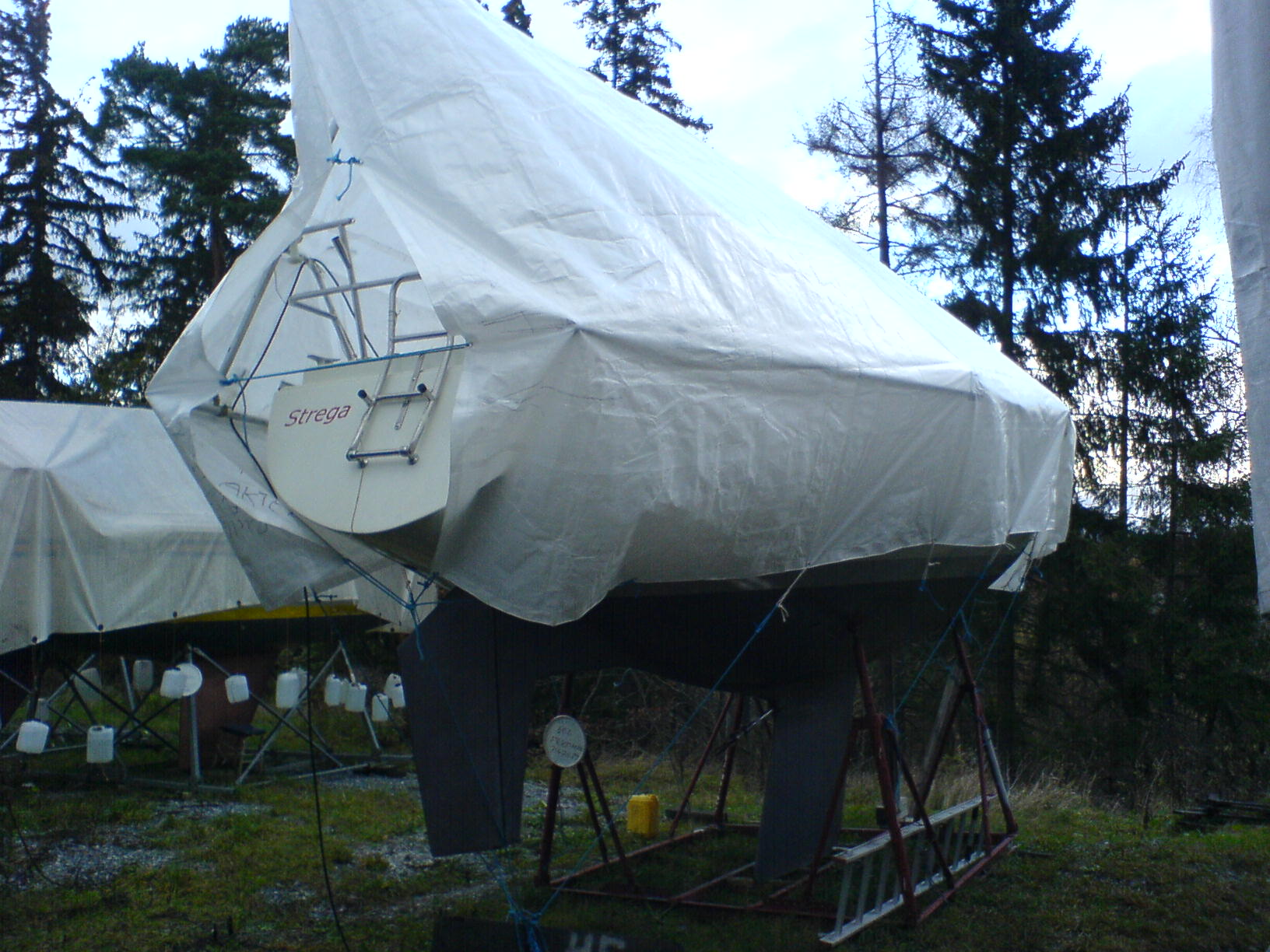 Pressening 200 gram efter två säsonger Foto : tagen av (mig själv) Hans Friedman 2007-10-20